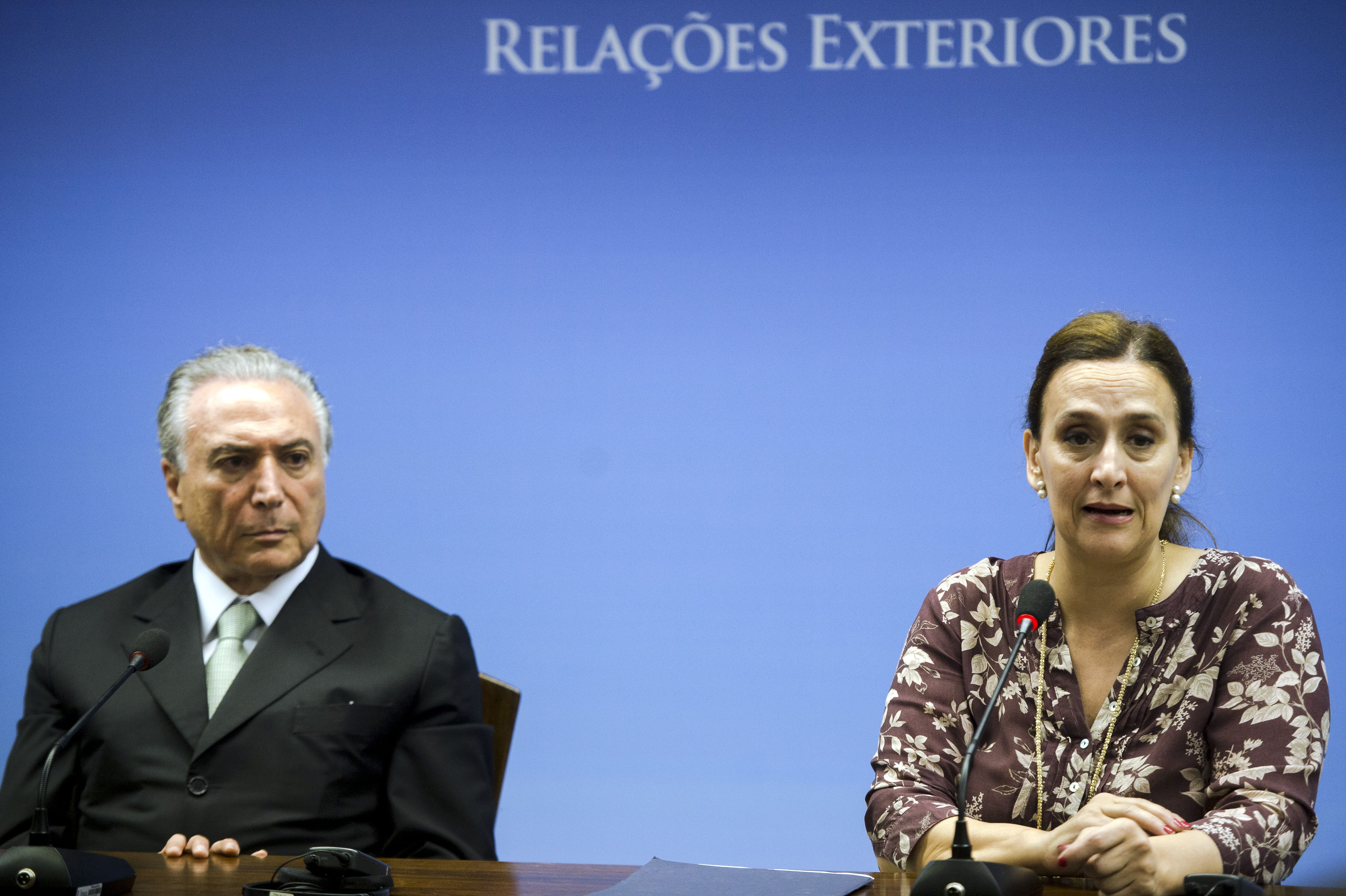 Brasília - O vice-presidente da República, Michel Temer, e a vice-presidenta da Argentina, Gabriela Michetti, durante entrevista coletiva no Palácio Itamaraty.